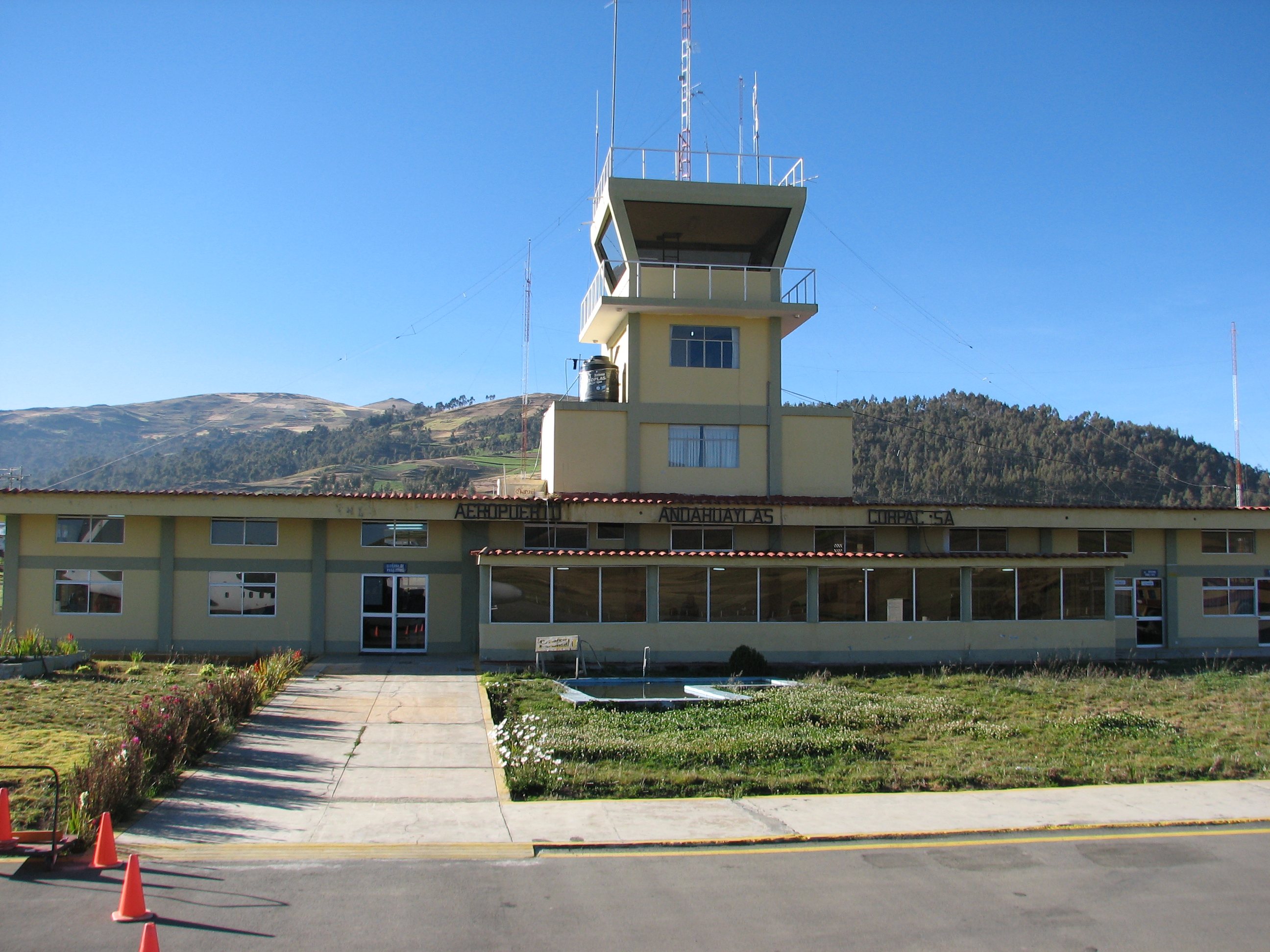 Airport Andahuaylas Peru